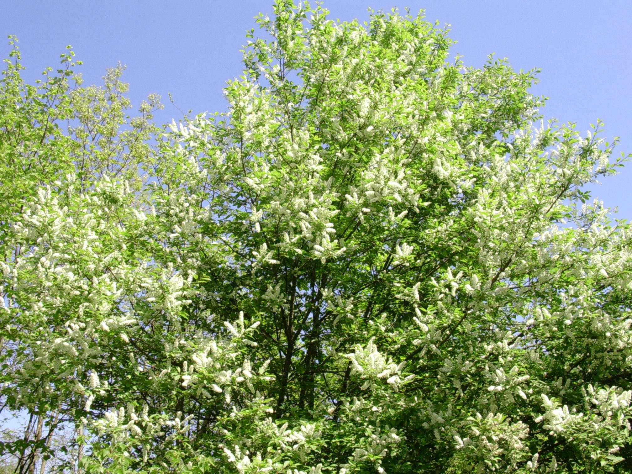 Un cerisier tardif merisier en fleur